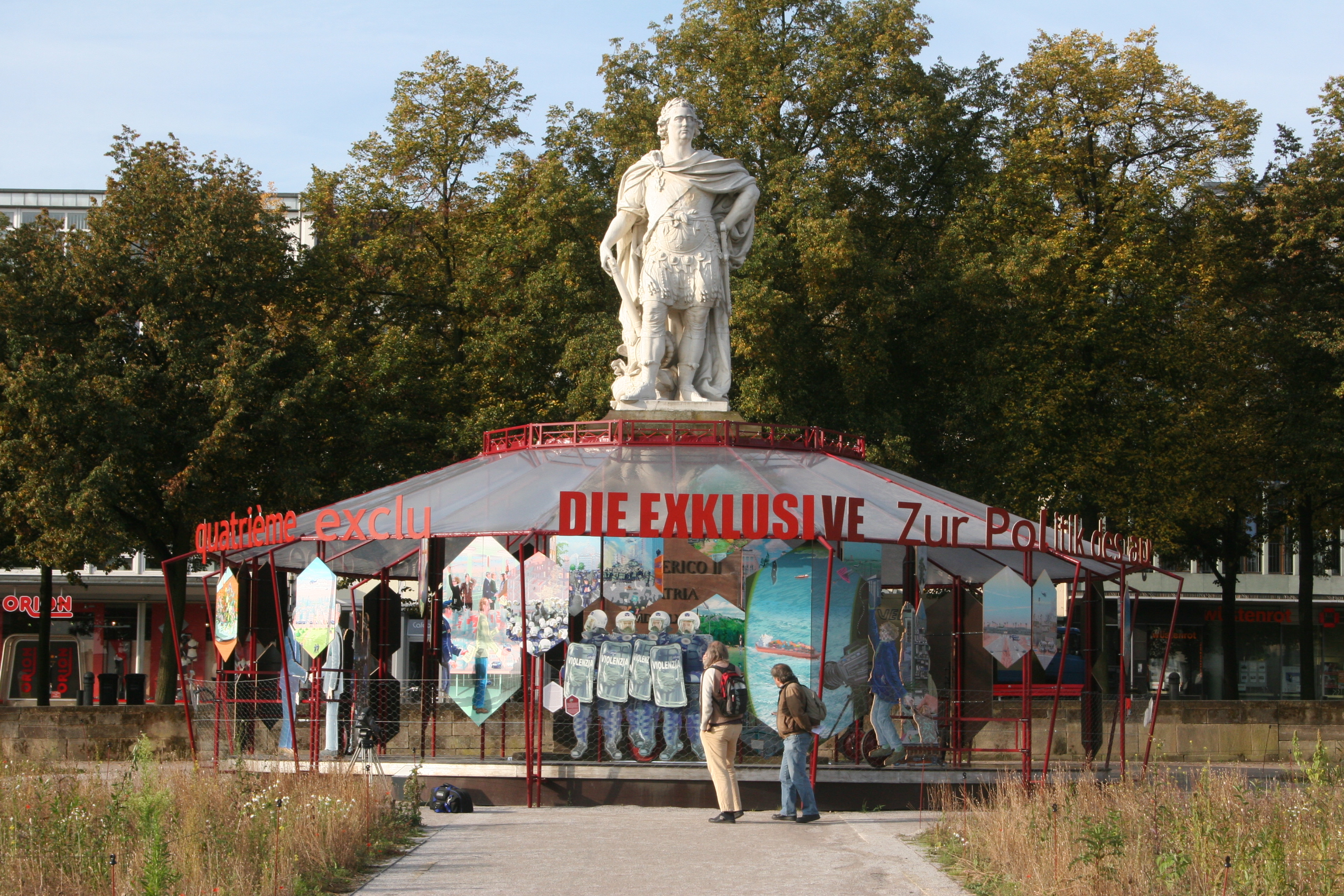 Standbild des Landgrafen Friedrich II. von Hessen-Kassel mit dem Kunstwerk "Die Exklusive – Zur Politik des ausgeschlossenen Vierten" von Andreas Siekmann während der documenta 12.